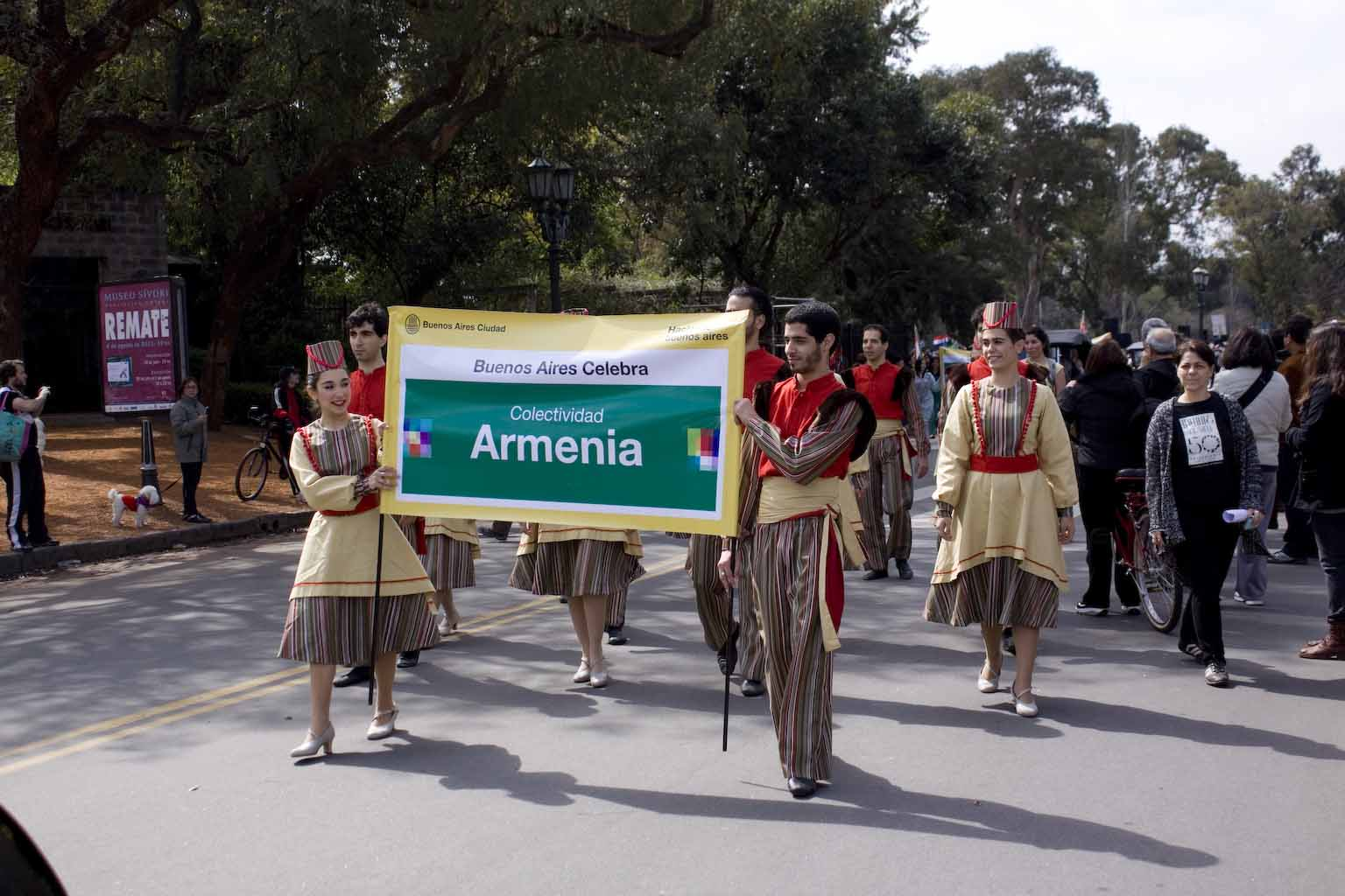 Dia del inmigrante 012